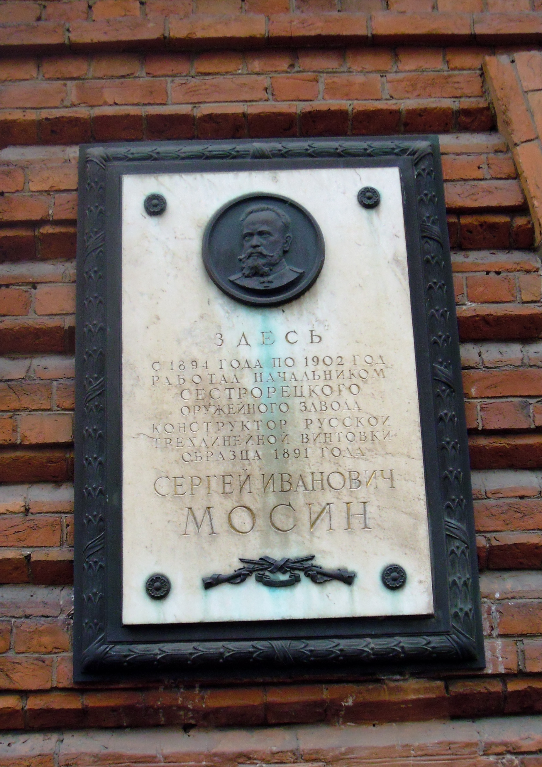 Памятная доска С.И. Мосину на здании управления Сестрорецкого инструментального завода